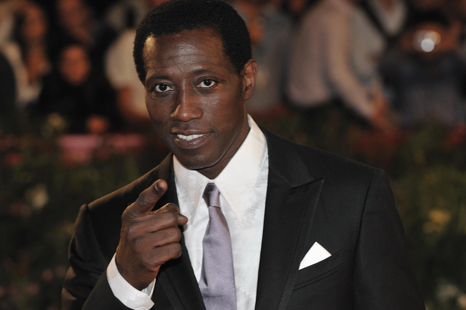 66ème Festival du Cinéma de Venise (Mostra), 8ème jour (07/09/2009) Tapis rouge avec Ethan Hawke et Wesley Snipes et le réalisateur Antoine Fuqua pour le film : Brooklyn's finest